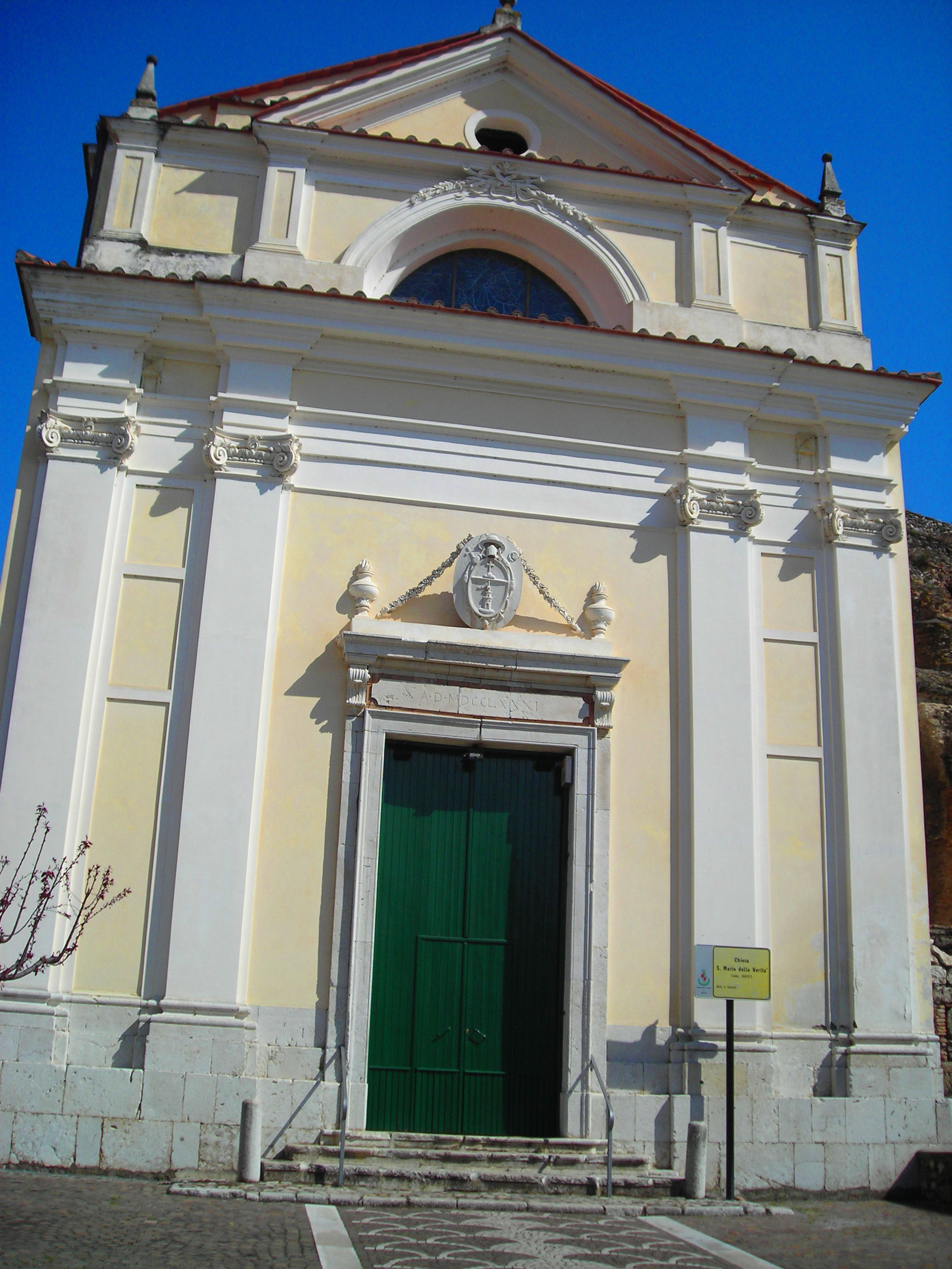 Chiesa di Santa Maria della Verità, Benevento